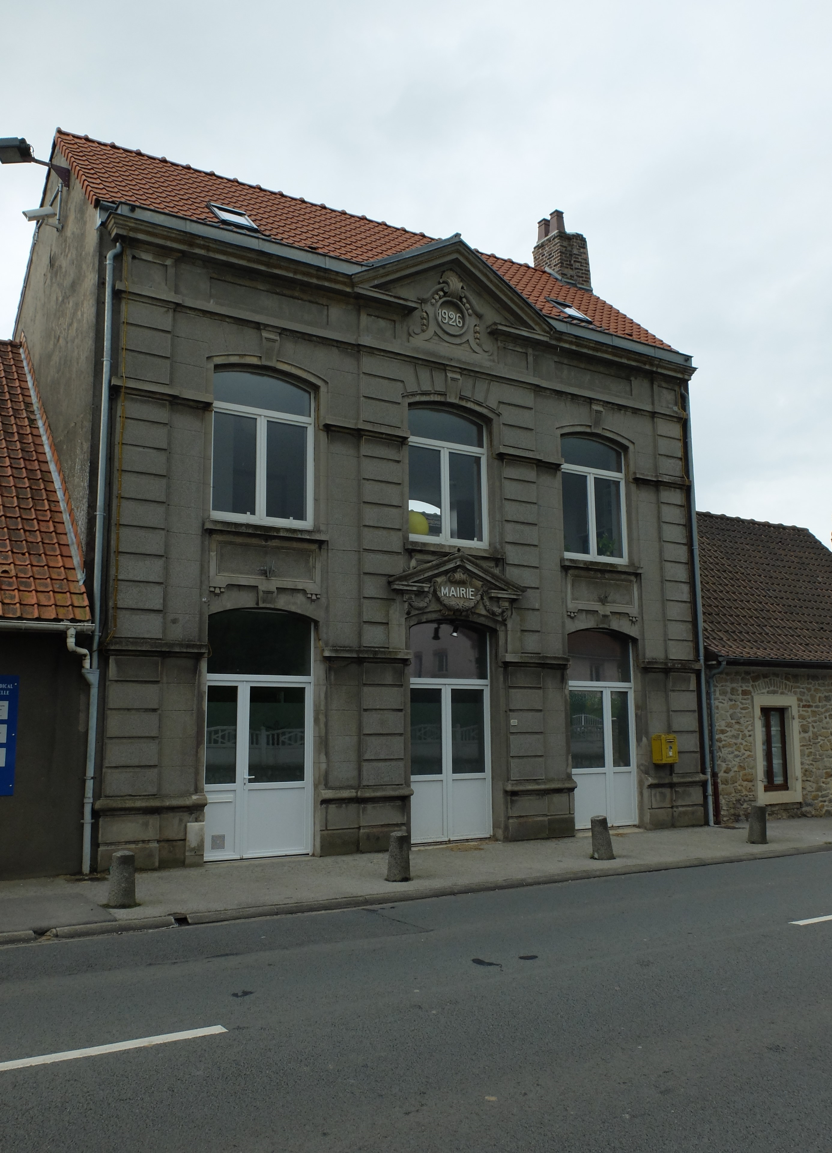 Vue de la mairie de Baincthun.